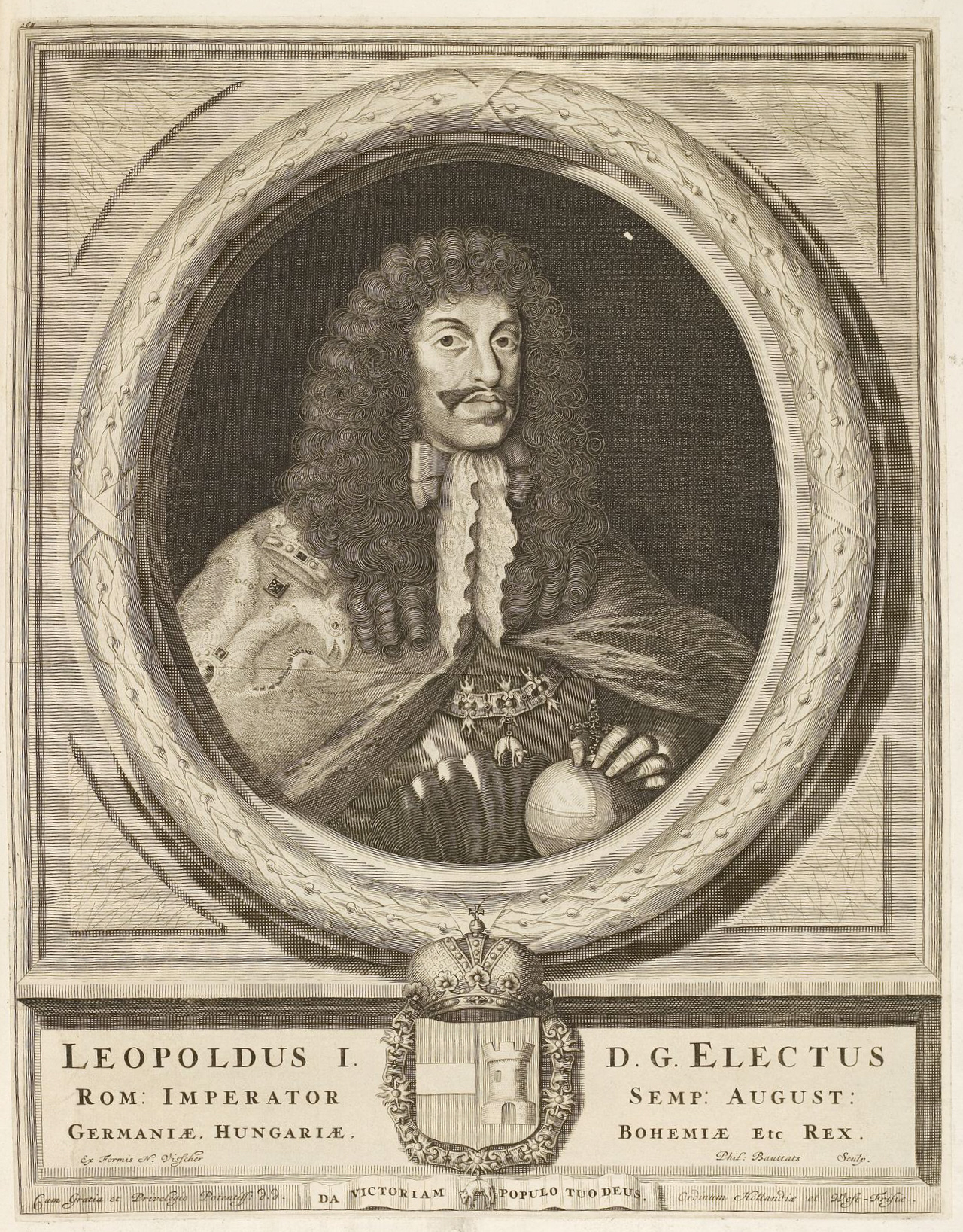 Grafik aus dem Klebeband Nr. 1 der Fürstlich Waldeckschen Hofbibliothek Arolsen Motiv: Kaiser Leopold I.